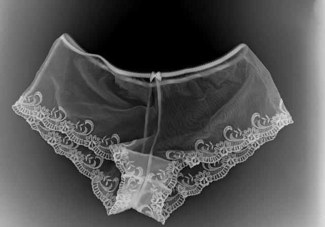 Věra Stuchelová´s photographs